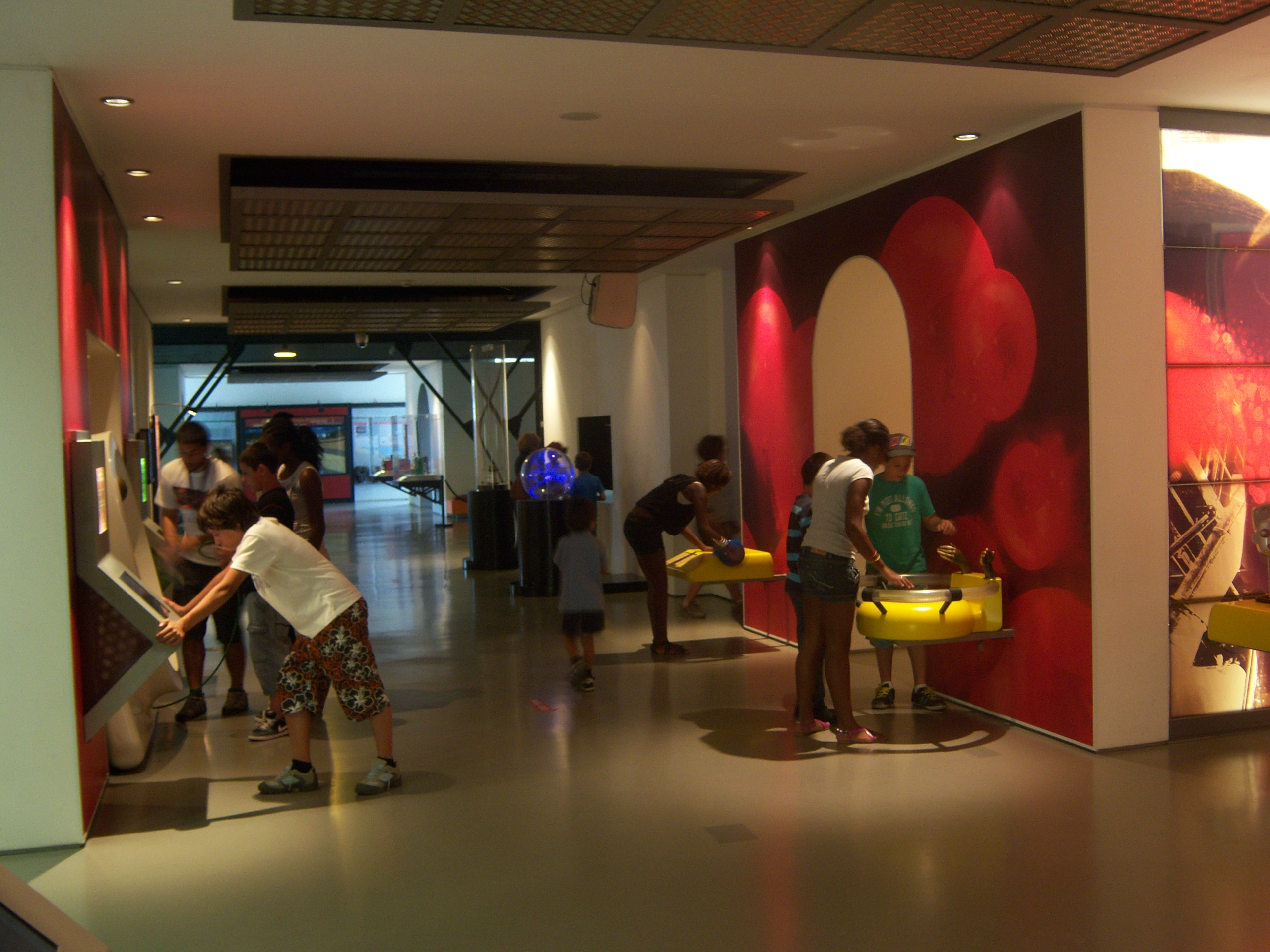 Vista da Sala de Experimentar